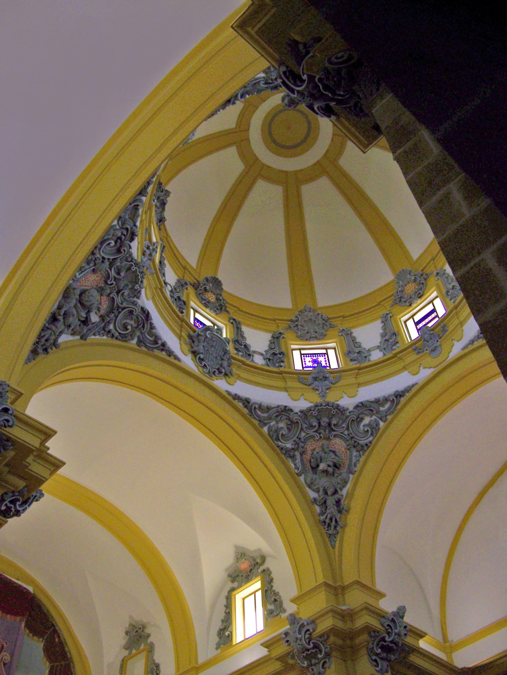 Iglesia de Santiago Apóstol : Cúpula, vista interior parcial - Albatera (Alicante, España).